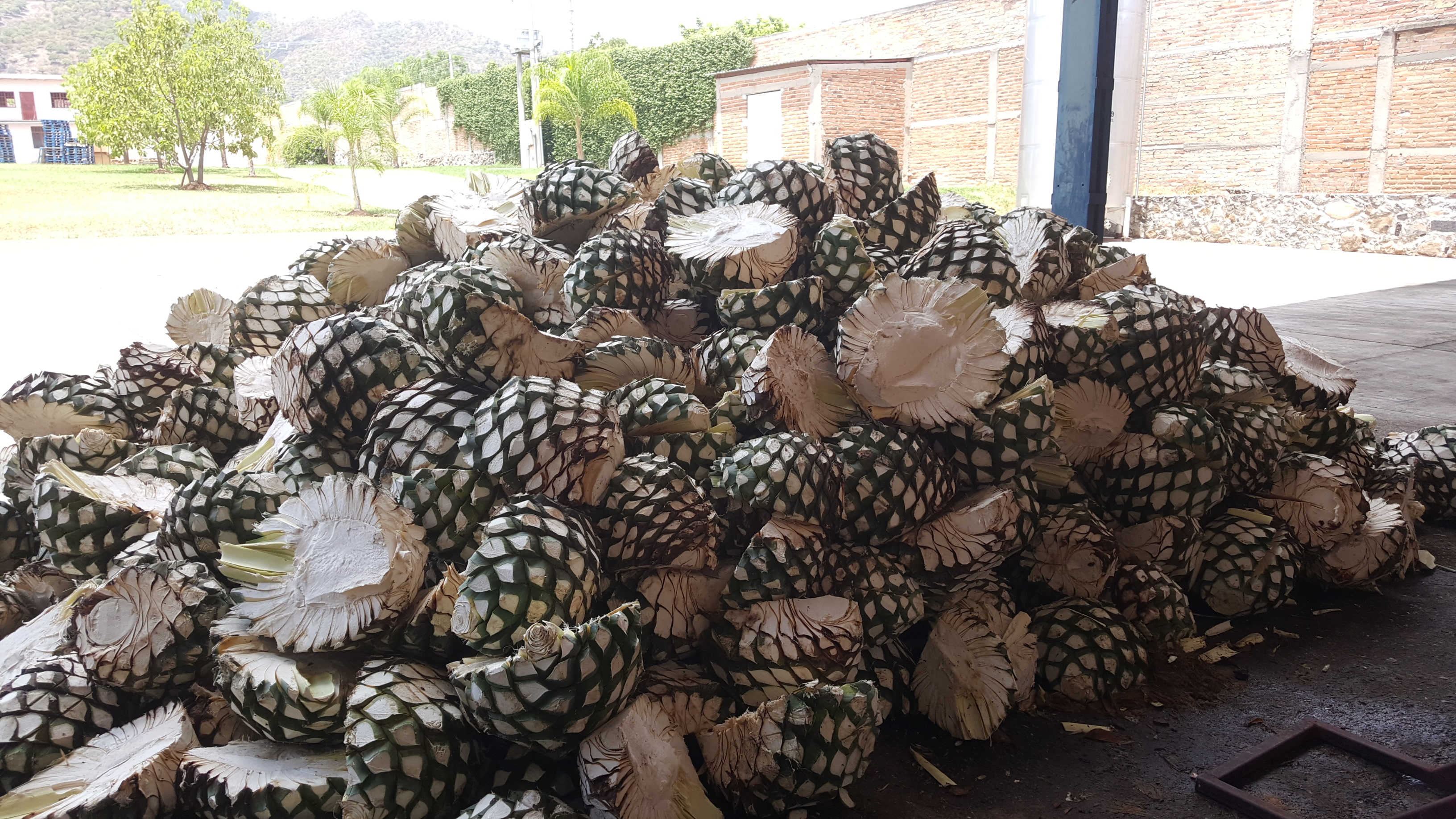 agave tequilana weber